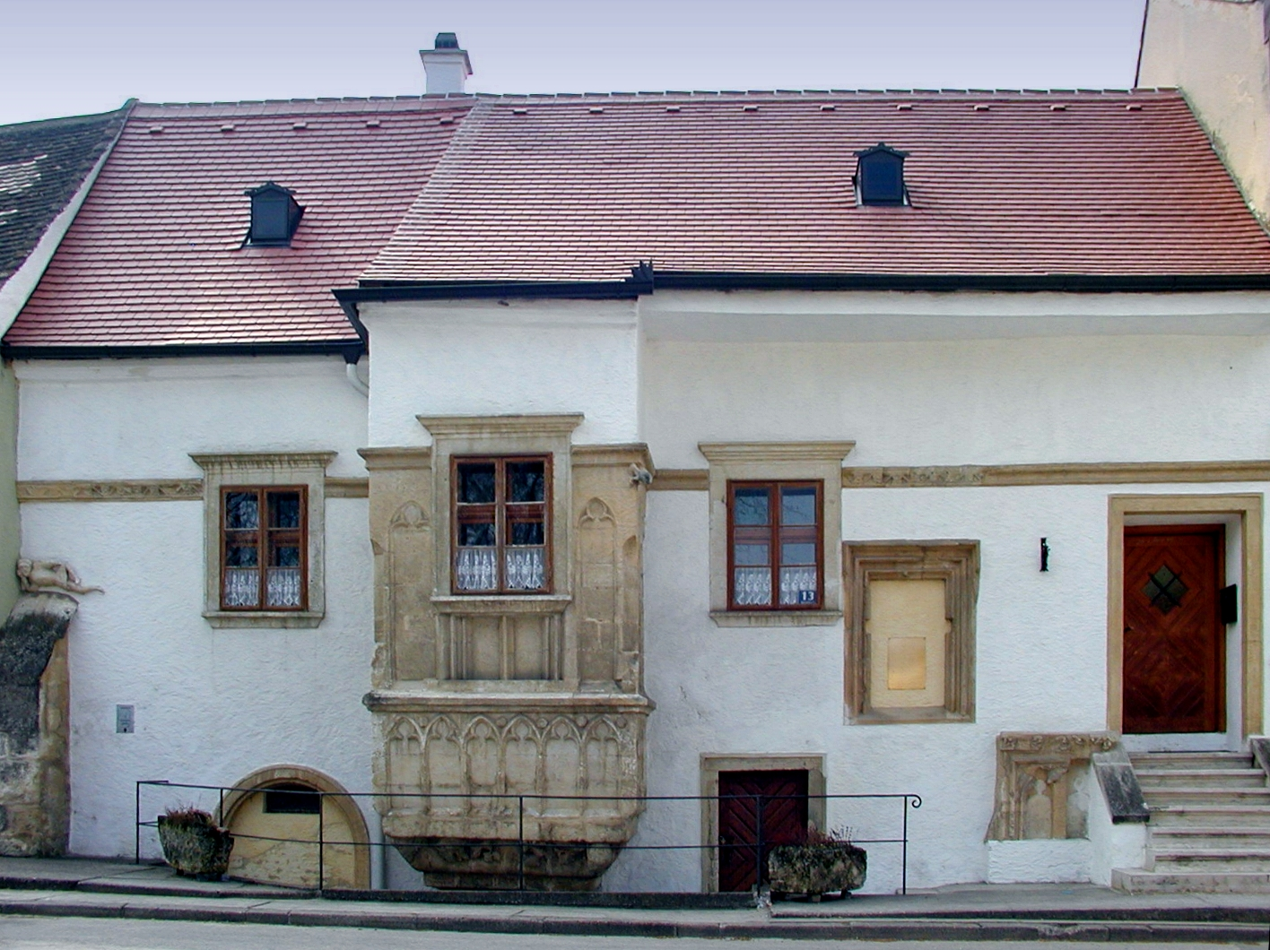 ehem. Kranken- und Waisenhaus in Sitzendorf, Sitzendorf an der Schmida Object location48° 35′ 51.79″ N, 15° 56′ 29.98″ E